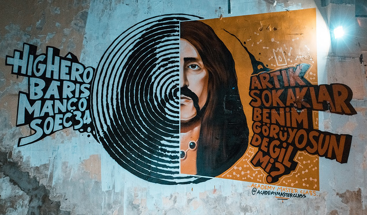 Baris Manco